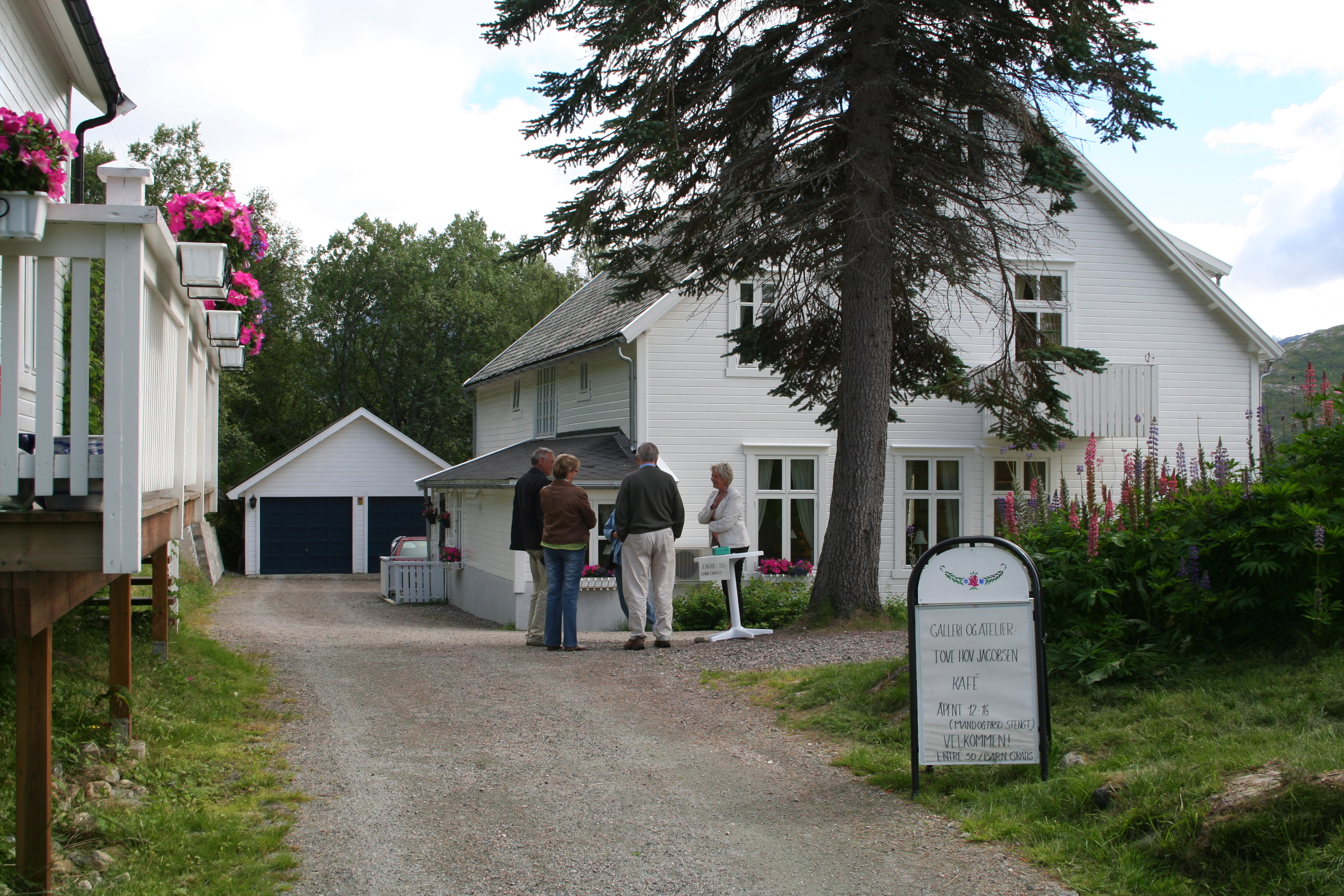 Lihallen Kulturgård er i dag galleri for kunstner Tove Hov Jacobsen. Det var tidligere tuberkulosehjem.